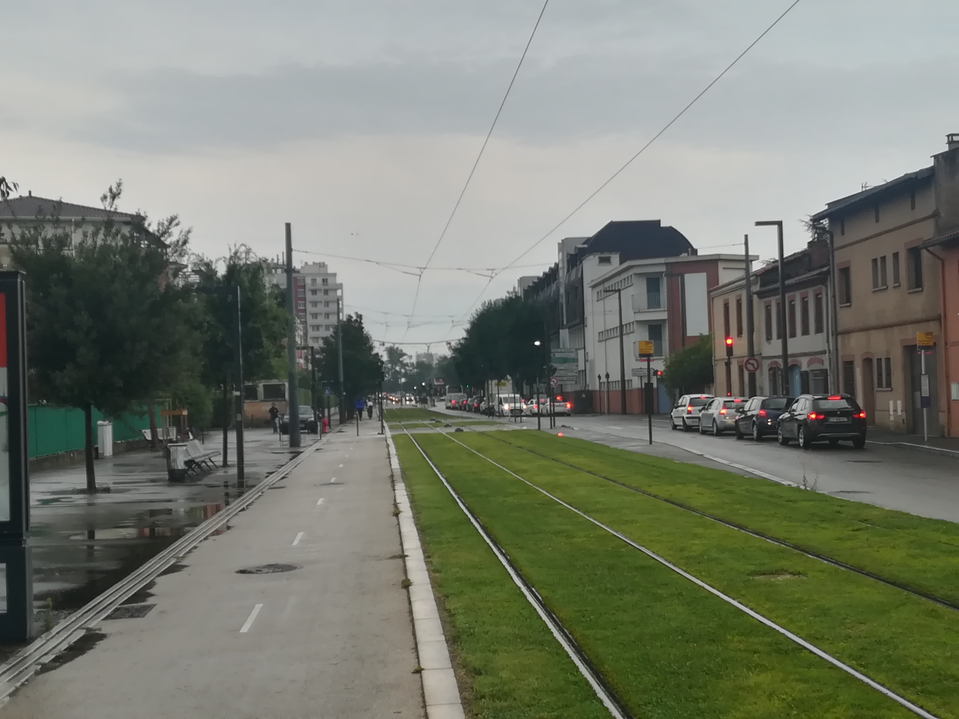 Le boulevard Déodat de Séverac à Toulouse.